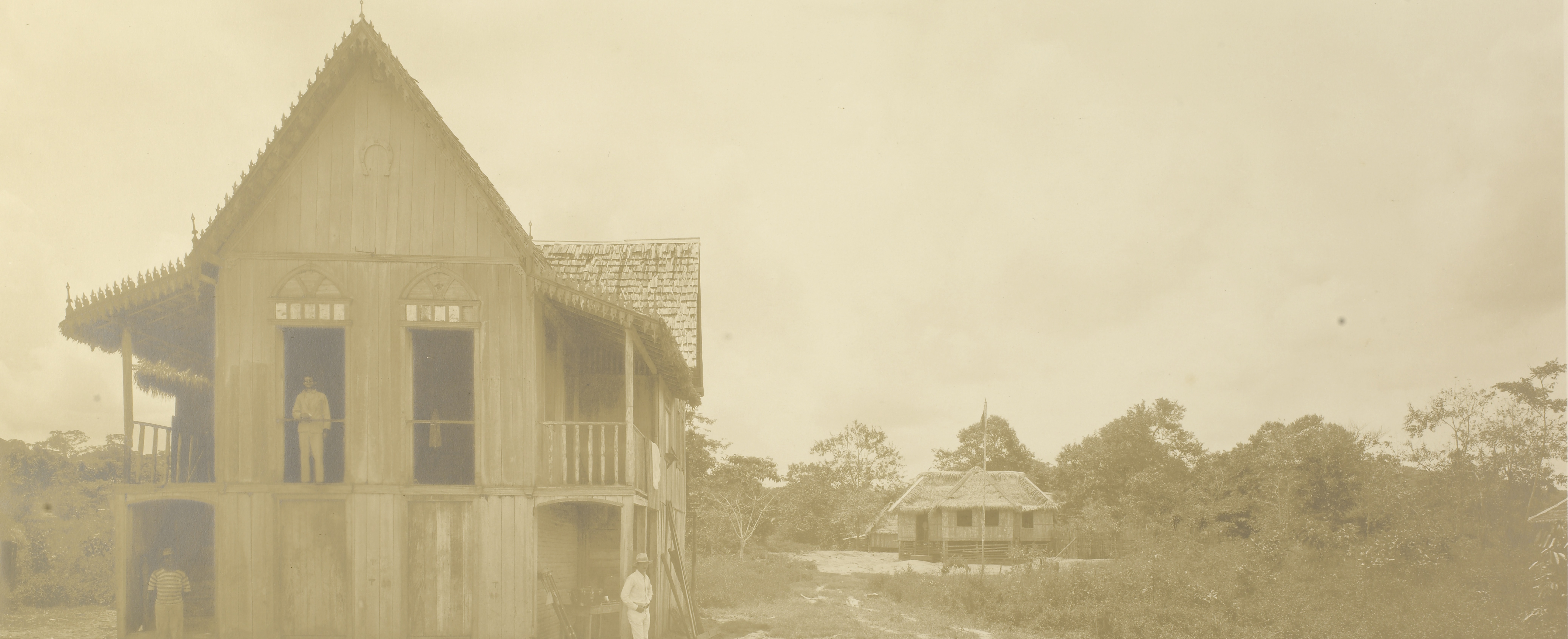 Imagem do Fundo Ministério da Guerra, do Arquivo Nacional